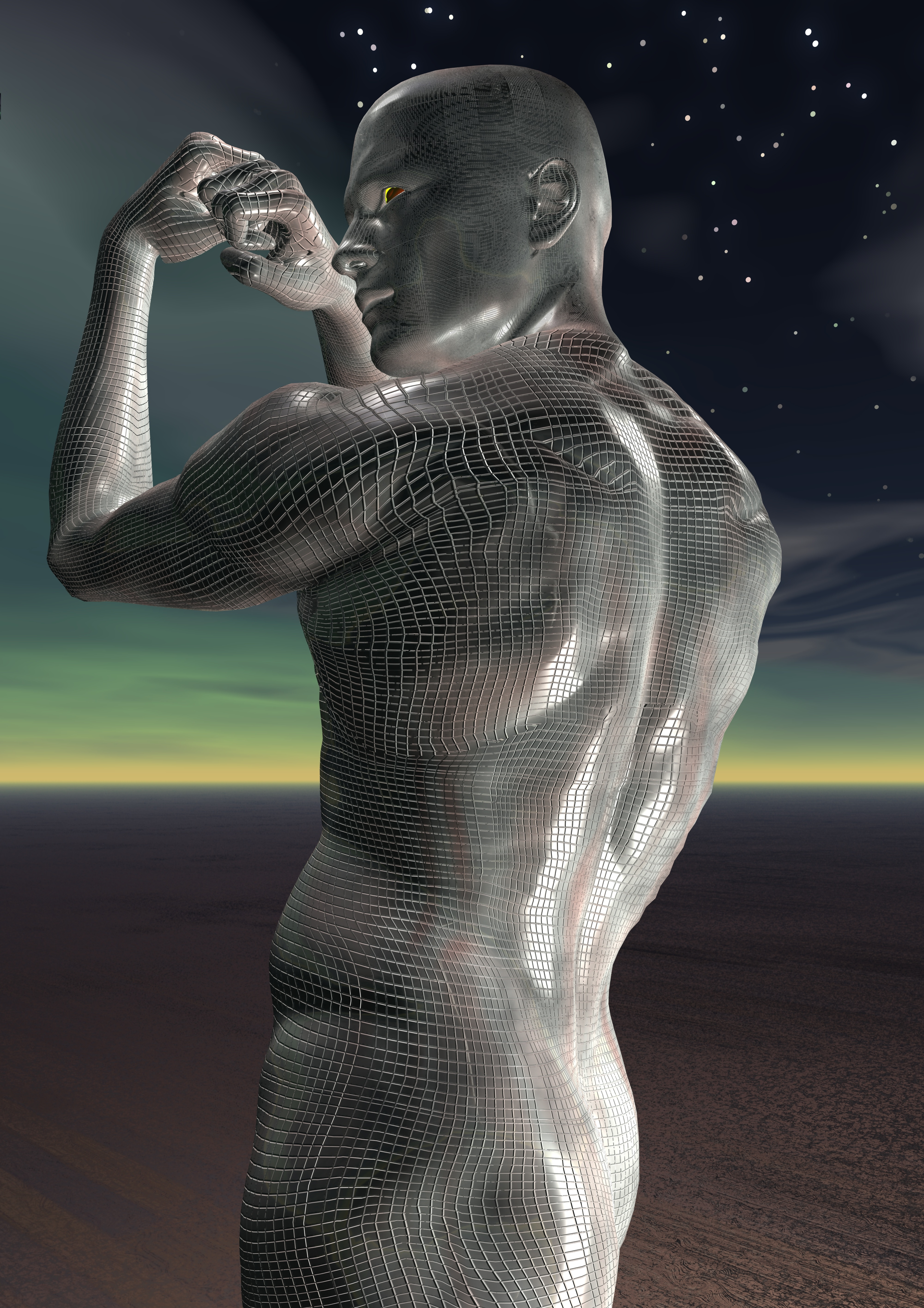 Adaptación del cuerpo Humano en la IA